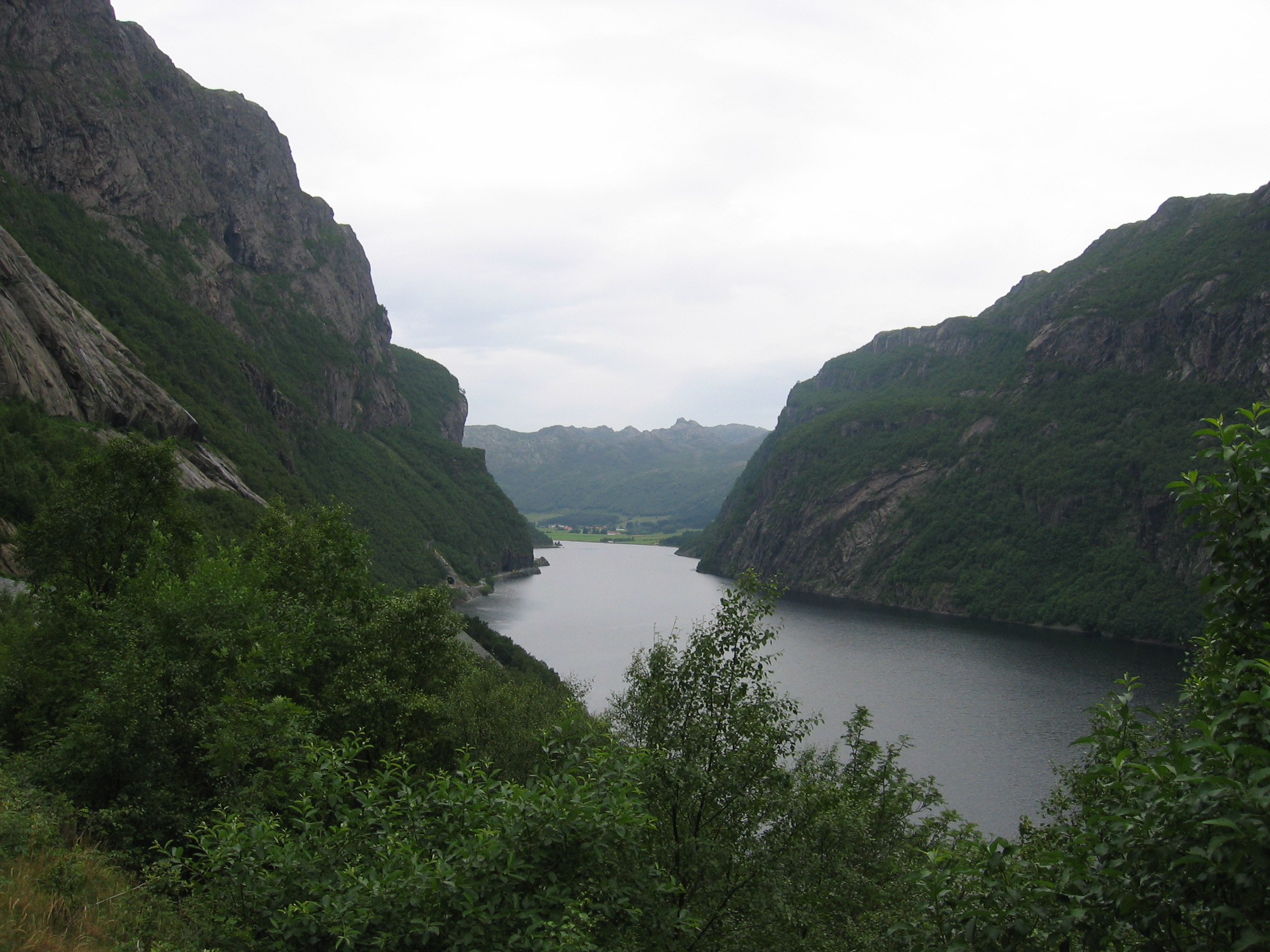 Indra Vinjavatnet lake in Bjerkreim, Norway